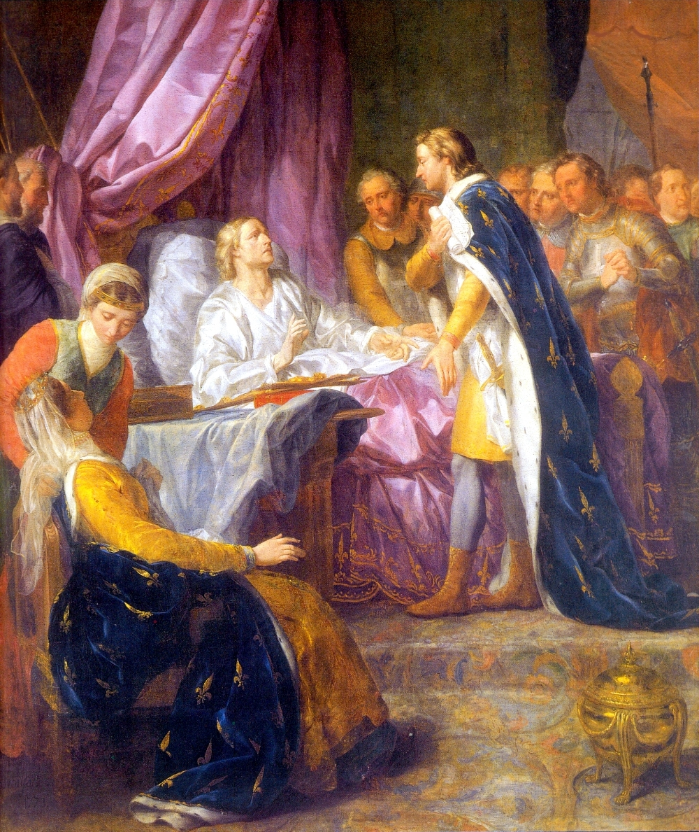 Saint Louis, roi de France, sur son lit de mort, donnant ses derniers conseils a son fils Philippe